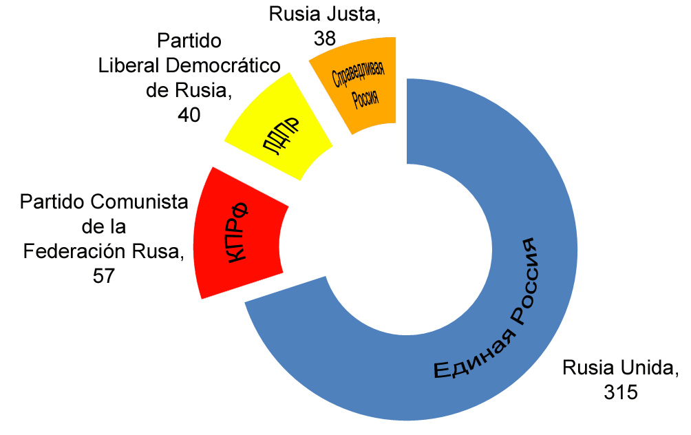 La distribución de escaños en la duma estatal rusa, resultado de las elecciones del 2 de diciembre de 2007